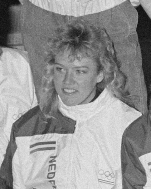 Ingrid Paul